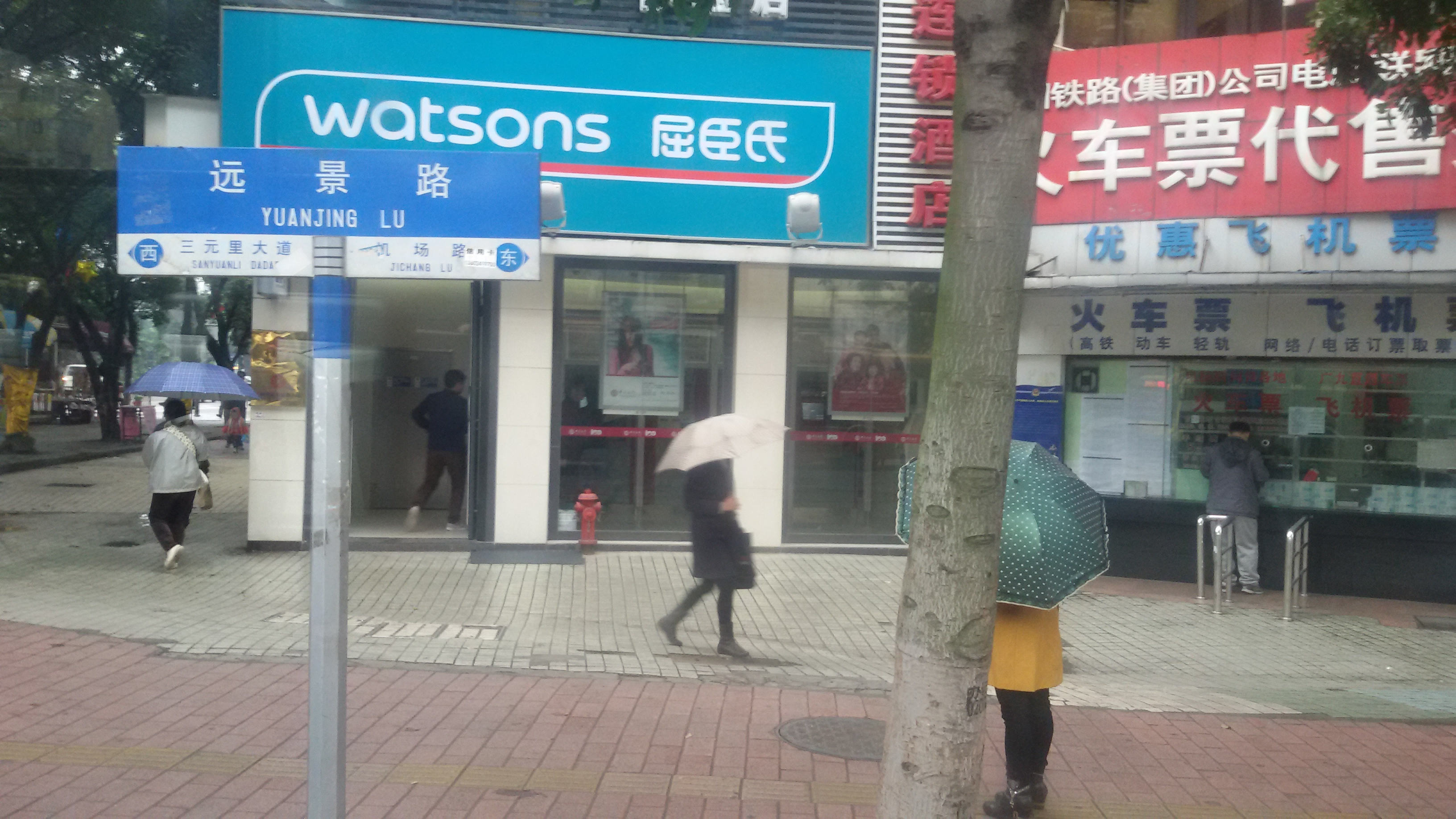 粵語: 远景路嘅路牌